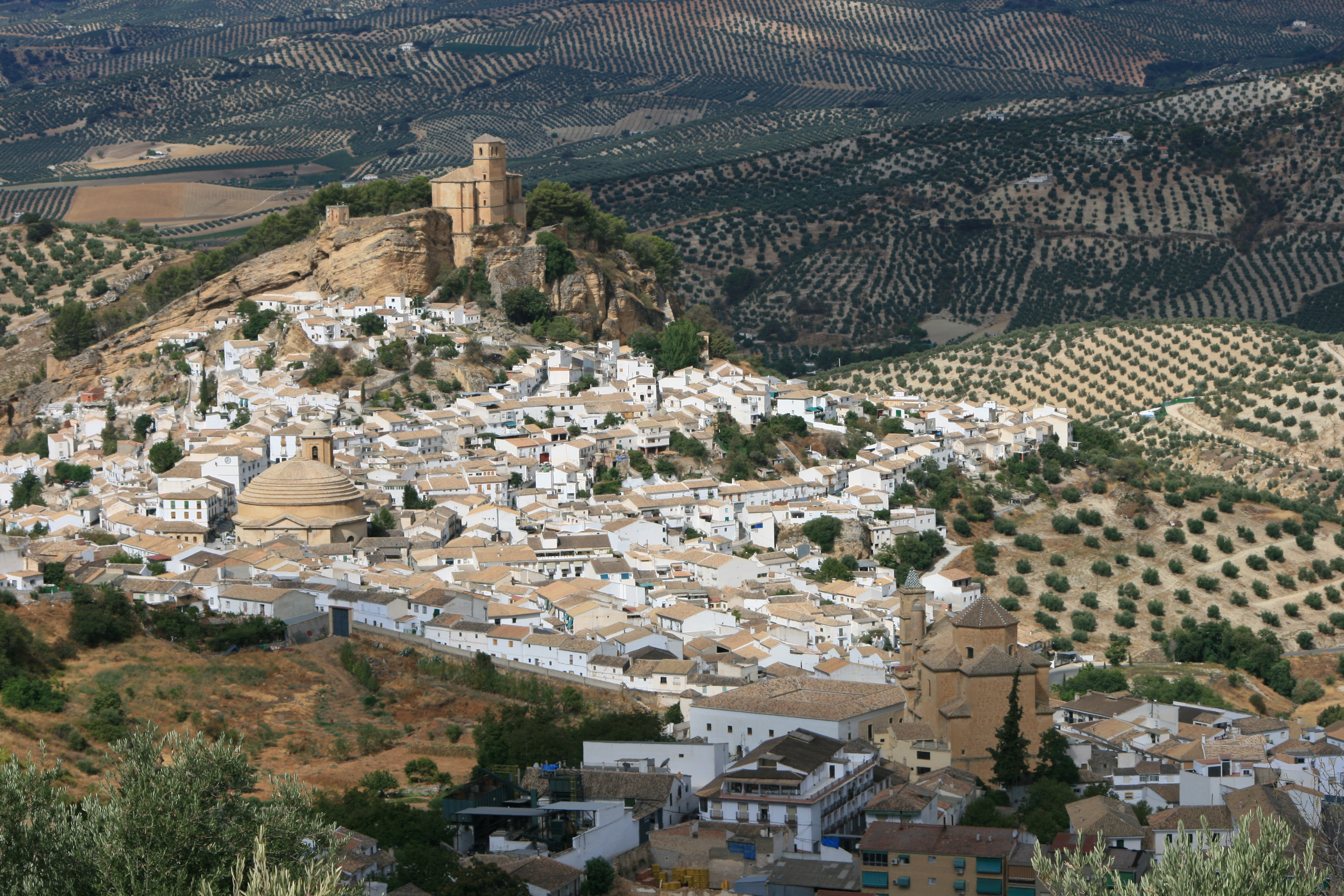 Vista general de Montefrío, en Granada (España)